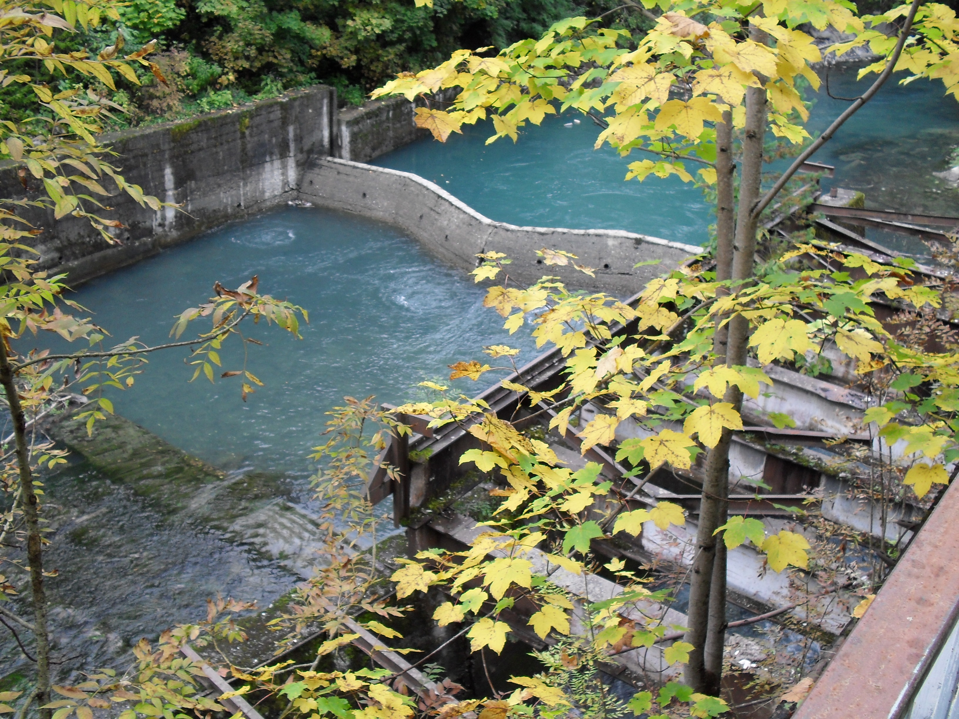 Абхазия. Начало р.Юпшара у озера Рица